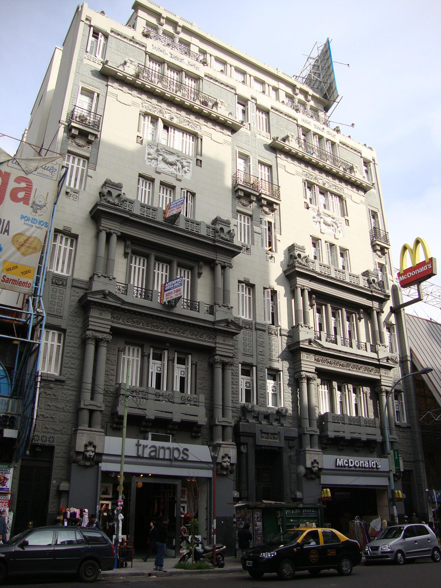 Edificio conocido como "Casa Grimoldi", en Avenida Corrientes 2548 a 2560. Arquitecto: Virginio Colombo. Estilo: Liberty Milanés. Año: 1918. Buenos Aires, Argentina.